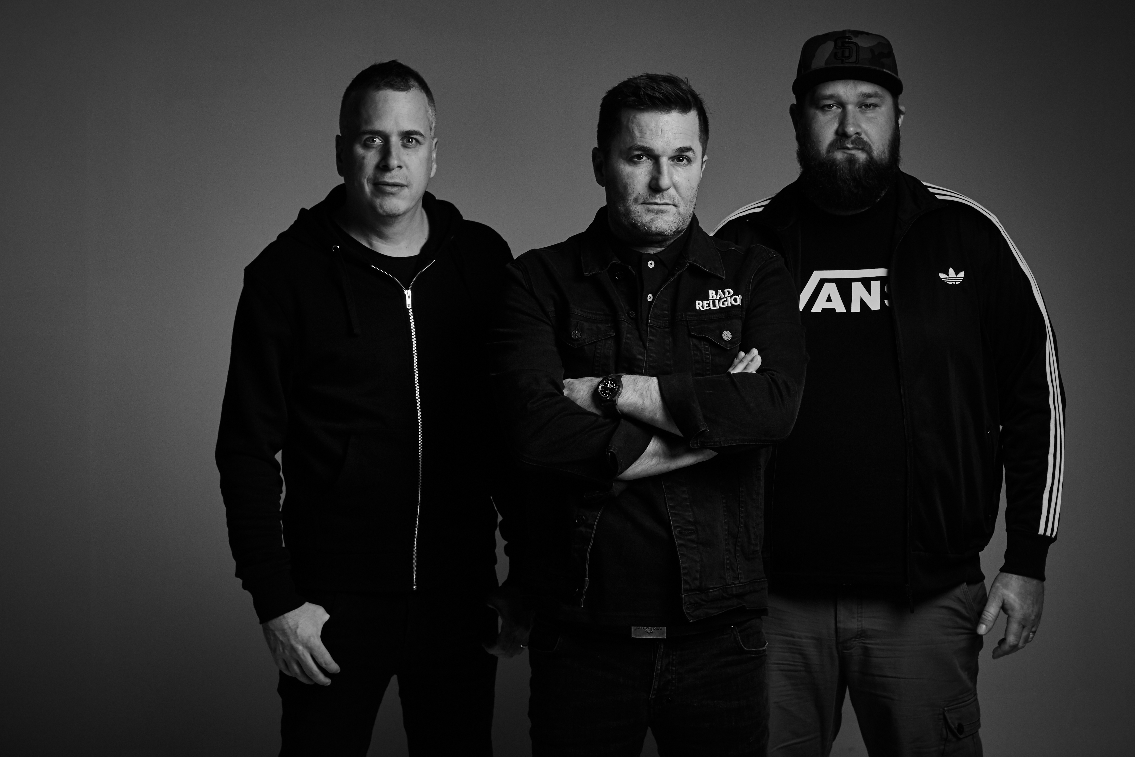 INEKAFE 2018